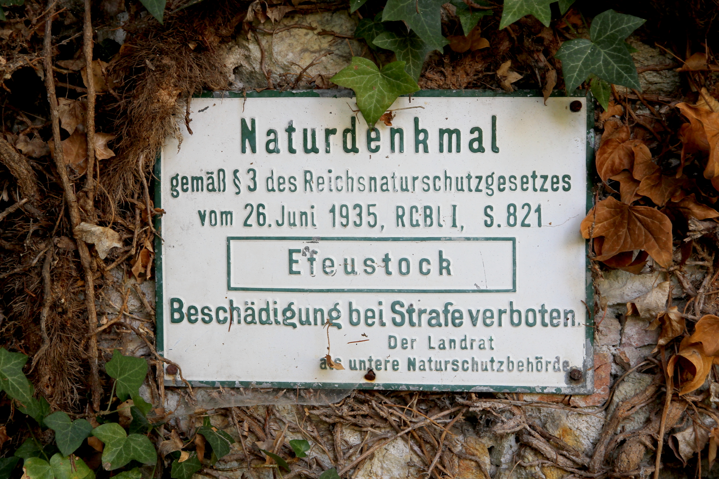 Reichsnaturschutzgesetz-Tafel in Kobersdorf bezüglich Unterschutzstellung eines Efeustockes.